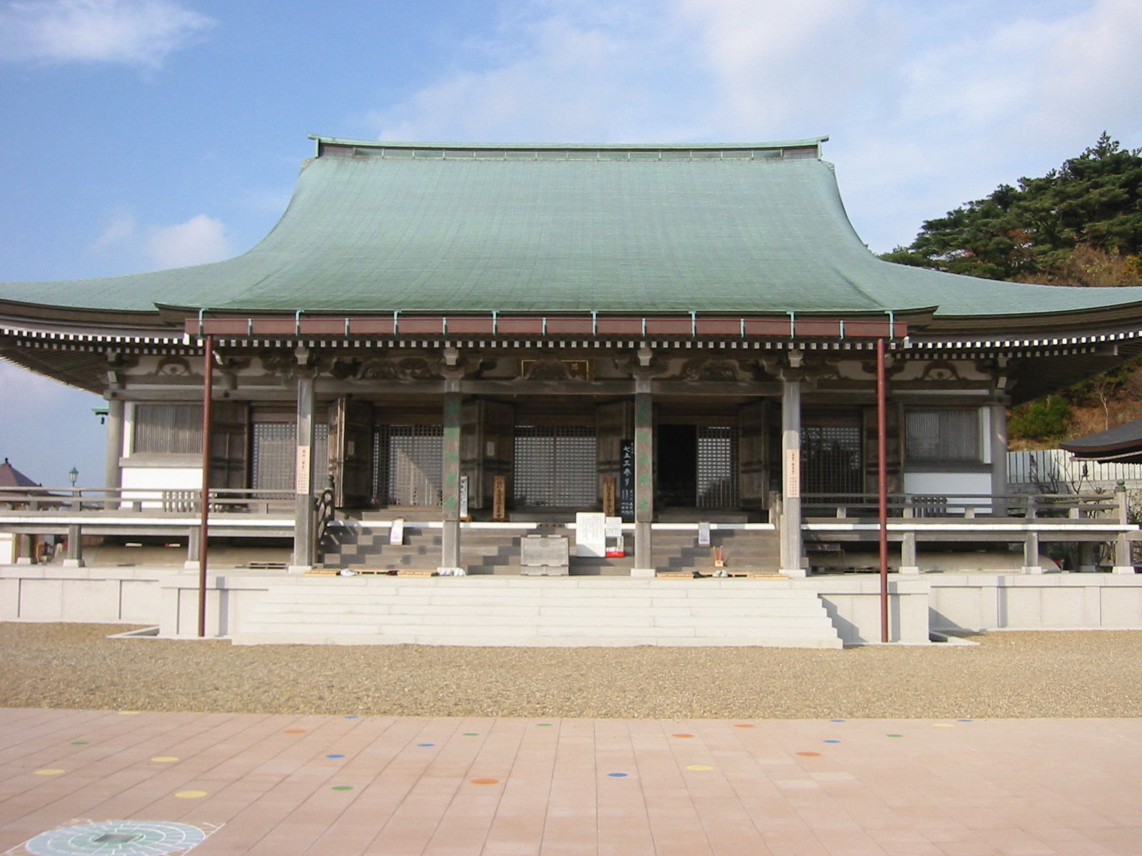 神戸 忉利天上寺（とうりてんじょうじ）